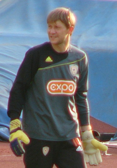 Денис Соловьёв 2009